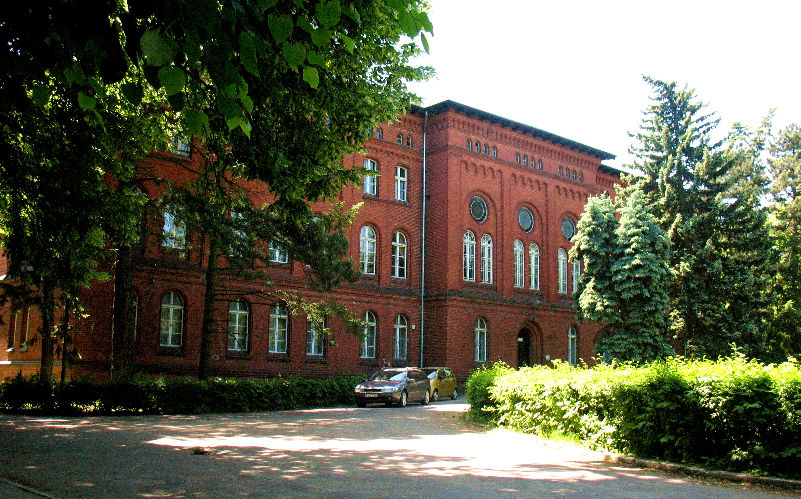 zespół szpitala psychiatrycznego, ul. Poznańska, k. XIX – XX: - szpital, ob. budynek administracyjny, 1890, ( zabytek-nr rej.: 72/Wlkp/A z 23.11.2001)